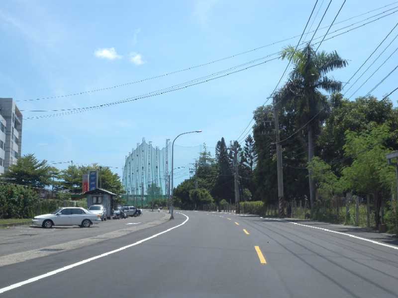 永康糖廠廠區道路現況